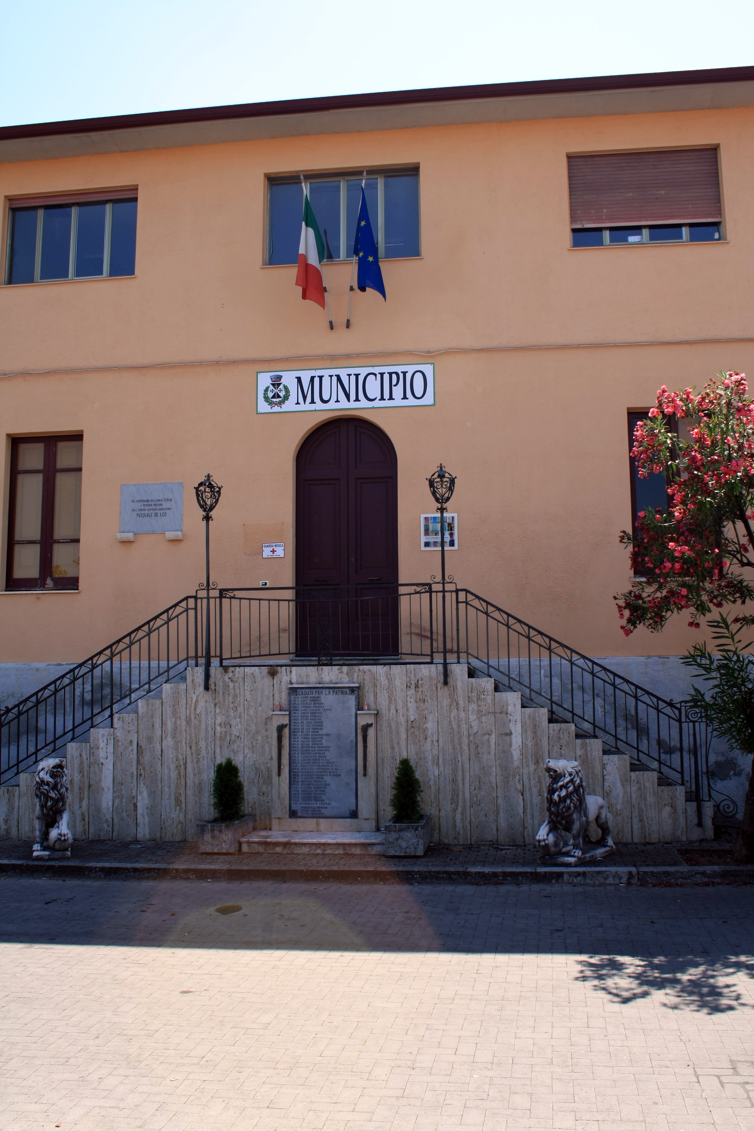 Sede del comune di San Procopio (Provincia di Reggio Calabria - Italy)